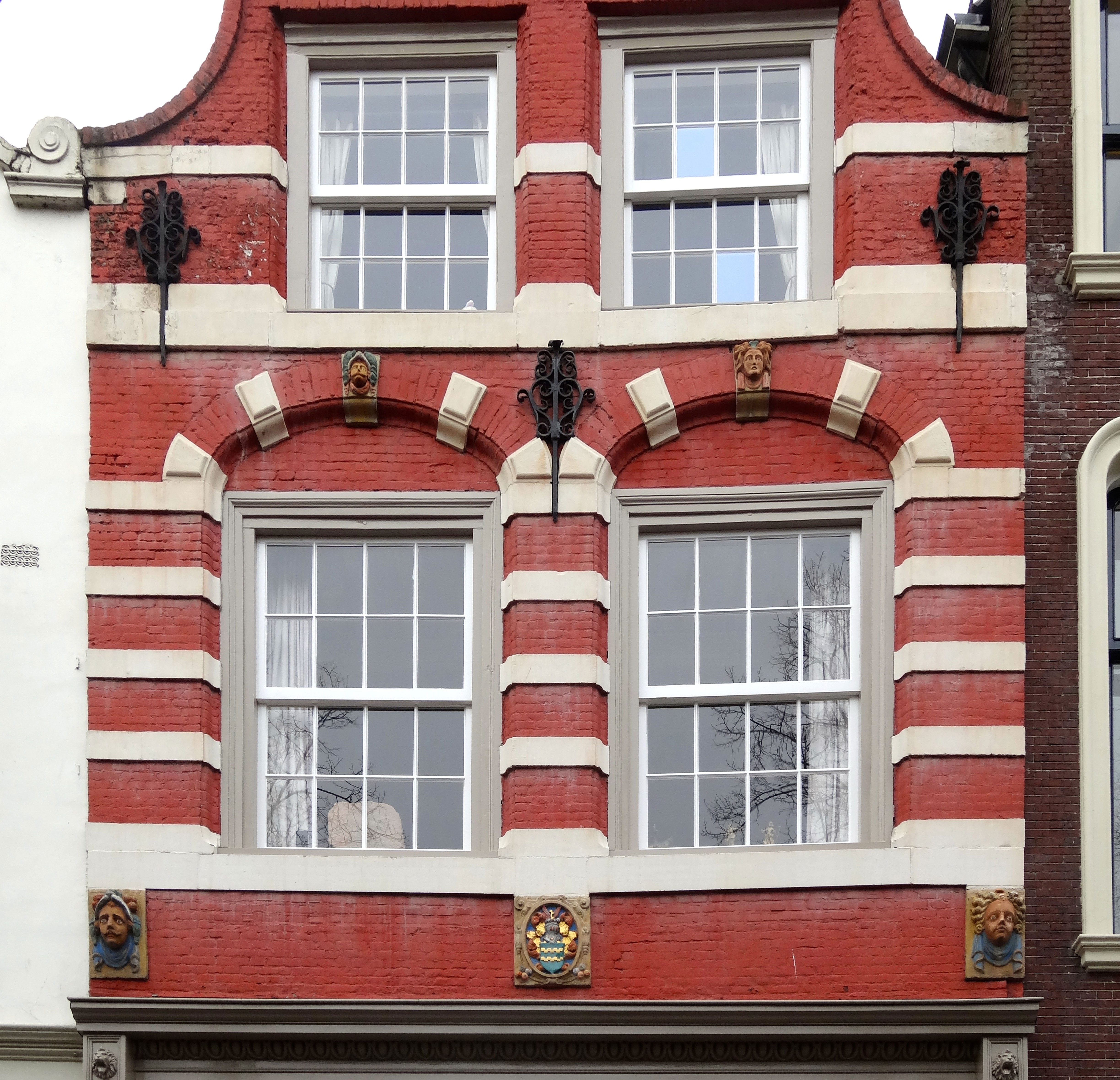 De "Wildeman", Westhaven 40